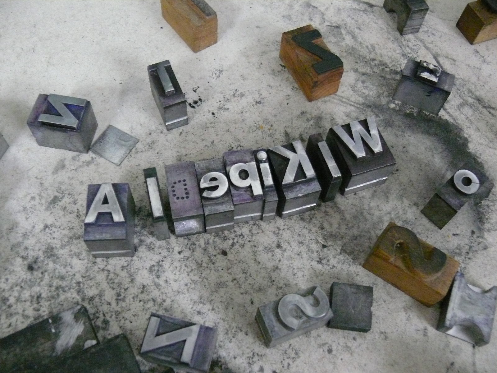 Czcionki w Muzeum Książki Artystycznej w Łodzi